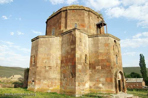 Église Saint-Jean (Sourp Hovhannès) de Mastara, Arménie (Ve siècle). Church of St John (Sourp Hovhannès) in Mastara, Armenia (Ve siècle). Chiesa San Jean (Sourp Hovhannès) di Mastara, Armenia (Ve siècle).